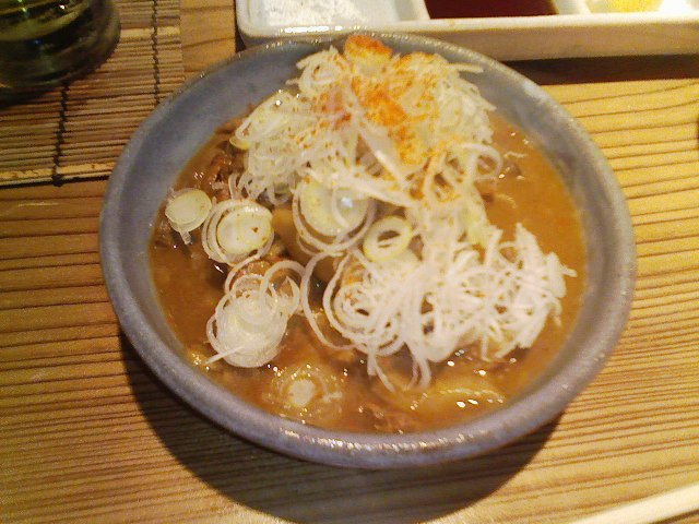 もつ煮込み（京都市左京区浄土寺西田町100-30、「串かつ 橙 だいだい」）